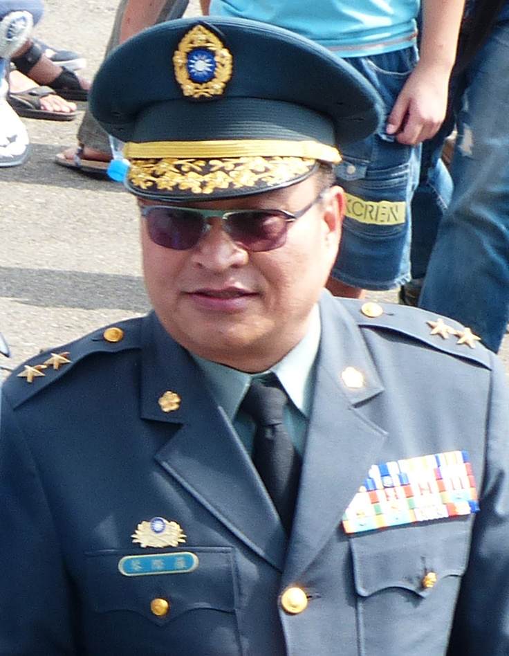 陸軍第十軍團指揮官羅際琴中將。